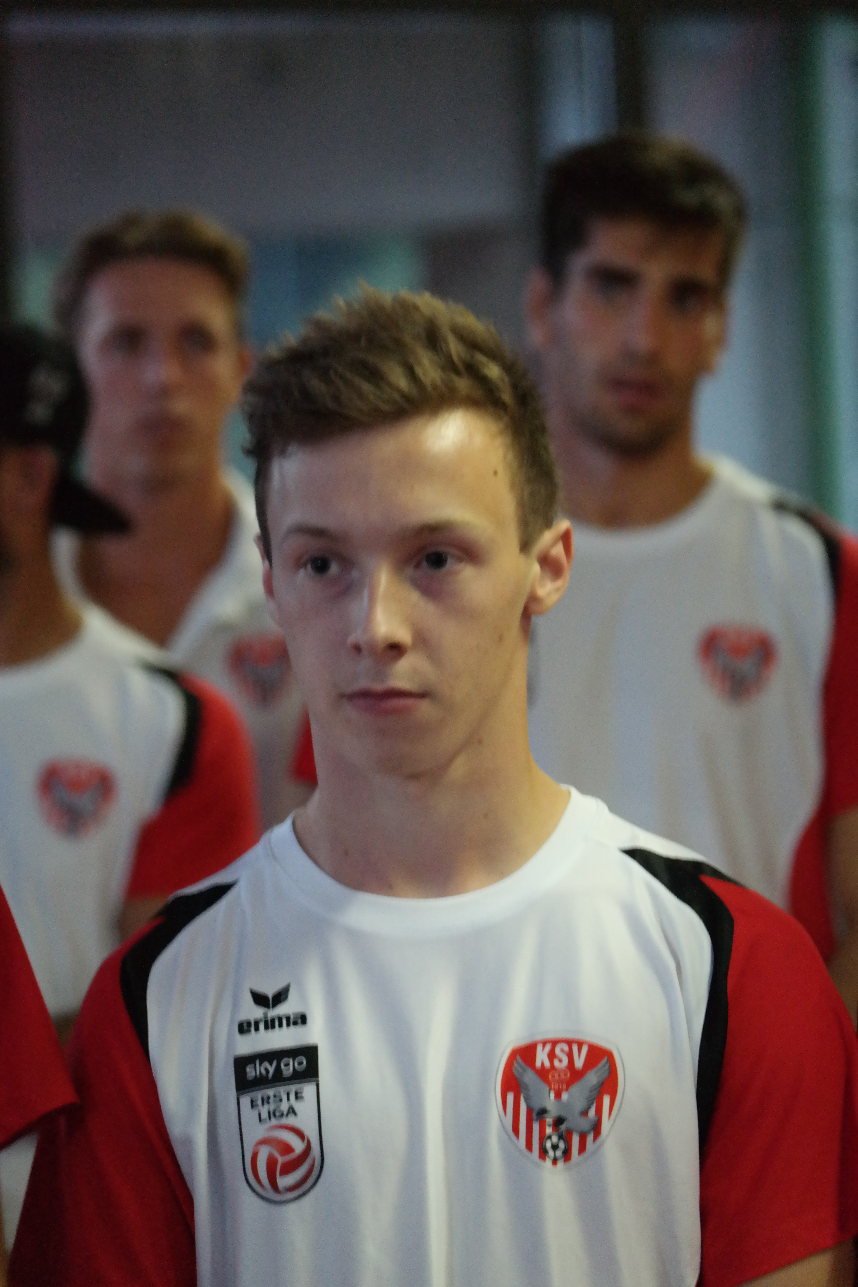 Mannschaftspräsentation der KSV im Juli 2017